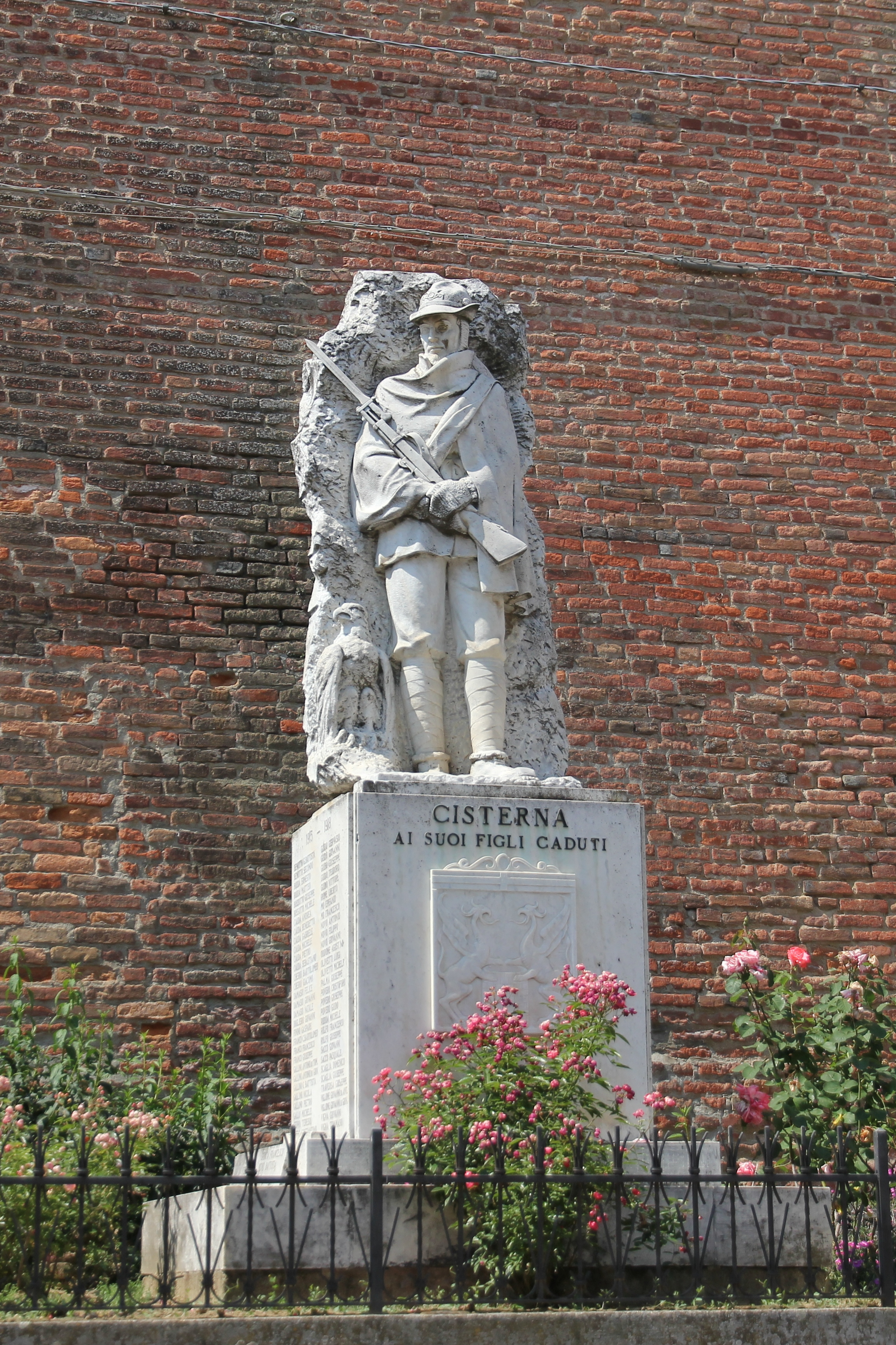 Cisterna d'Asti